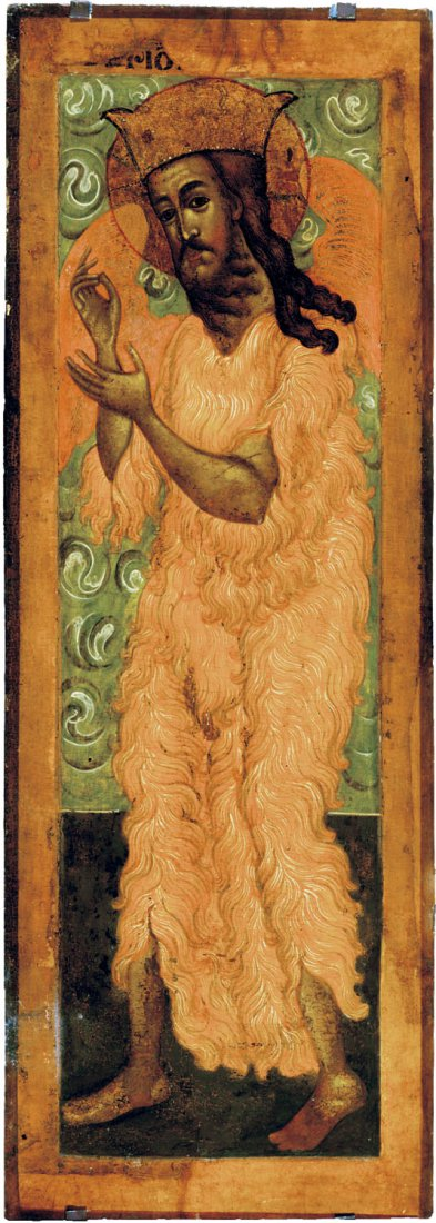 John Baptist. Icon from Siberia, Russia ПРОРОК ИОАНН ПРЕДТЕЧА. Сибирское письмо. Вторая половина ХVII века. Дерево, темпера.125х43х4 Пост. в 1935 из Знаменского монастыря, Иркутск. Исключительная популярность в Сибири образа Иоанна Крестителя вполне объяснима особой миссией православных в этих краях. Икона из деисусного чина (деисус - моление) изображает Предтечу в традиционной позе предстояния, но с крыльями и в короне, что свойственно иконографии Иоанна как Ангела Пустыни. Изящная фигура Иоанна и легкая его поступь, характерный рисунок рук с тонкими запястьями и нежные краски изысканного колорита - в этом вдохновенном образе святого прослеживаются черты иконописи устюжских мастеров. В заполнении фона - не очень умелое, но легко читаемое изображение знака абсолюта. Однако этот мотив, удачно согласуясь с ритмическими завитками одеяния святого, несет здесь скорее декоративную функцию. Иркутский художественный музей